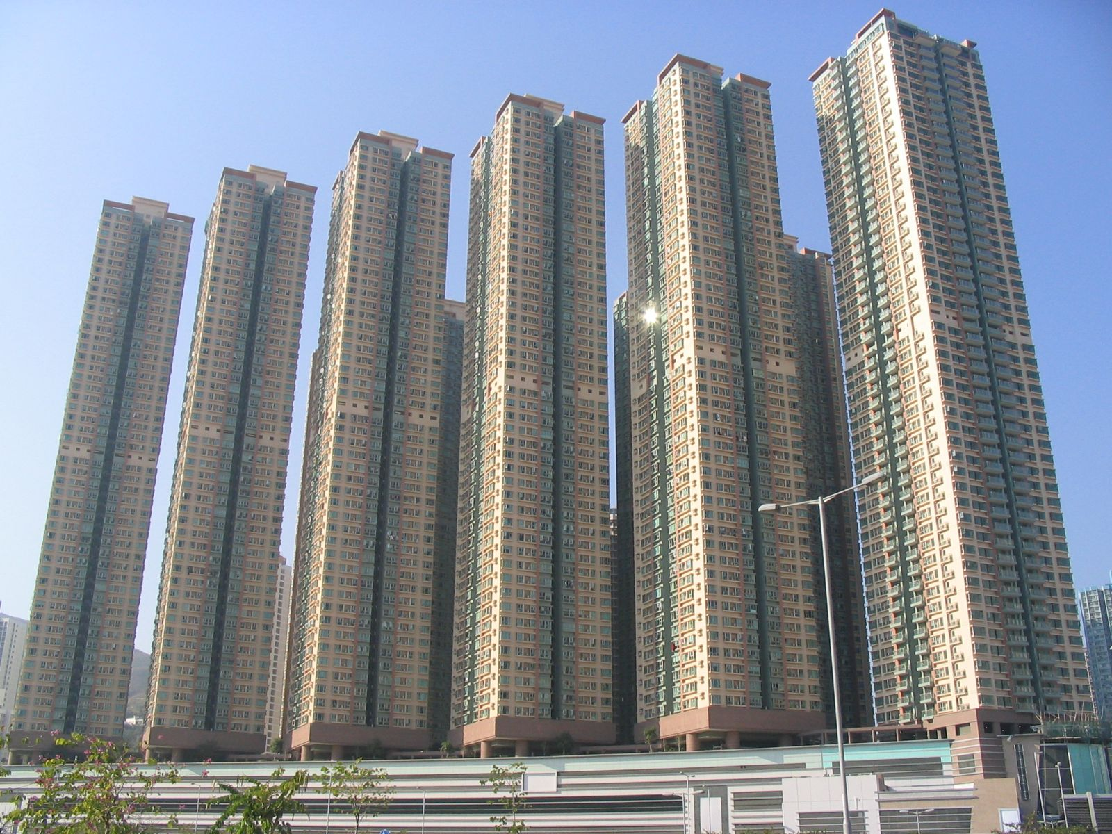 將軍澳-將軍澳中心 Park Central, Tseung Kwan O